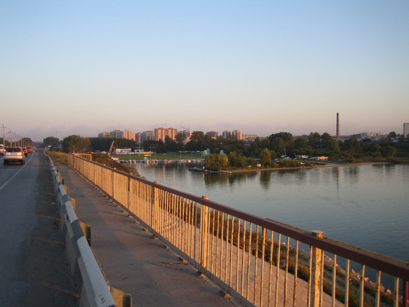 яхтклуб и мр-н Северный (31.08.07)